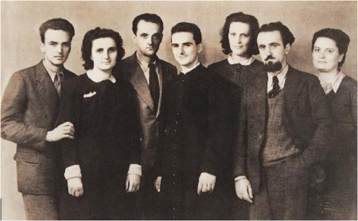 Os irmãos e as irmãs Beretta no dia da primeira S. Missa de padre José. De esquerda: Enrico (frei Alberto), Gianna, Ferdinando, padre José, Virgínia, Francisco, Zita.